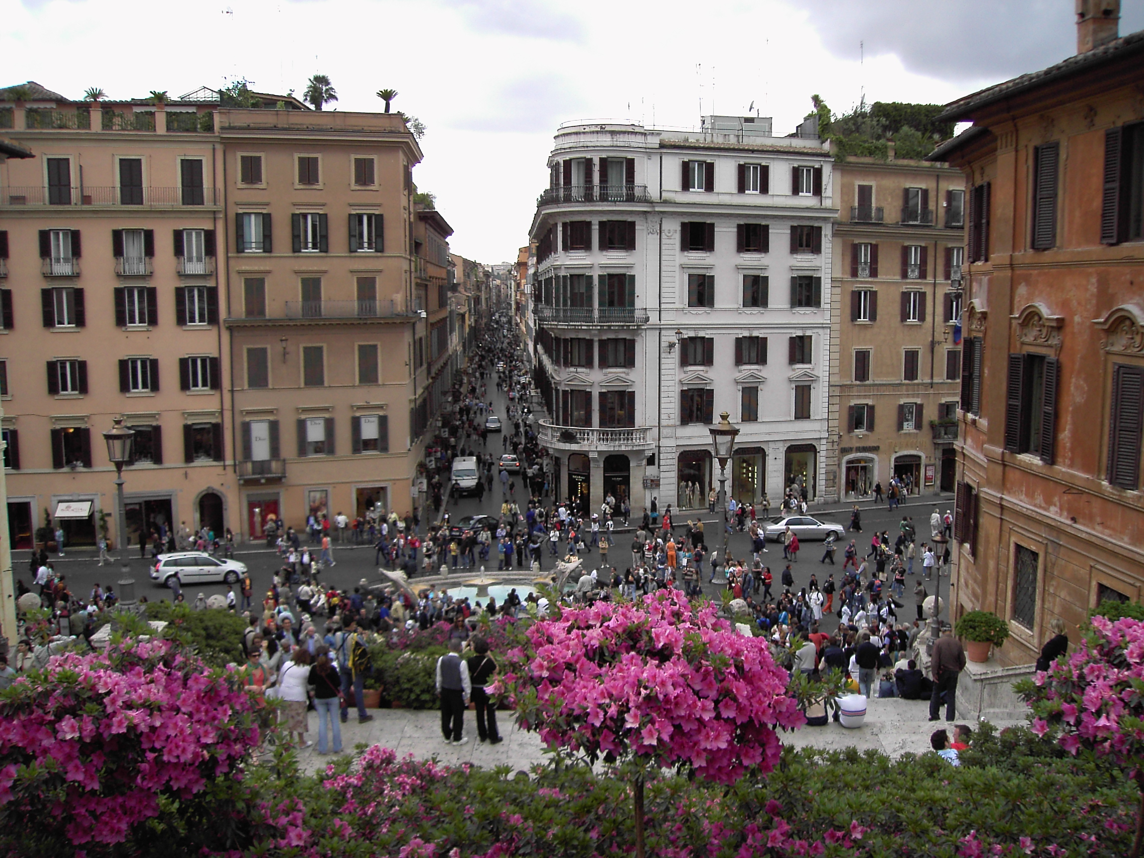 Roma, via Condotti dalla Trinità dei Monti.